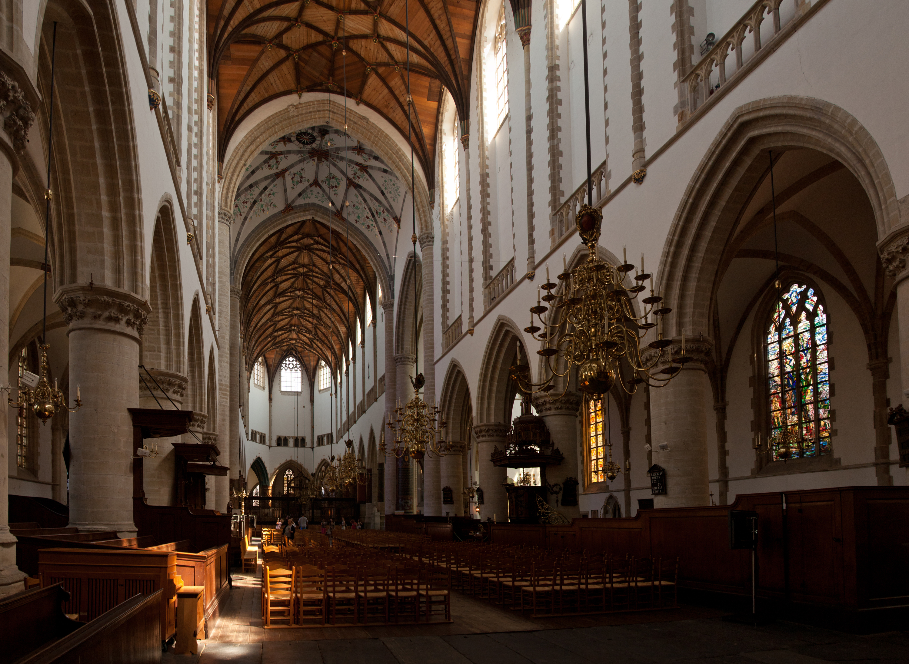 Interieur van de Grote of Sint Bavokerk te Haarlem